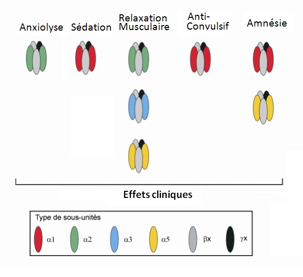 Récepteurs BZD sous-types